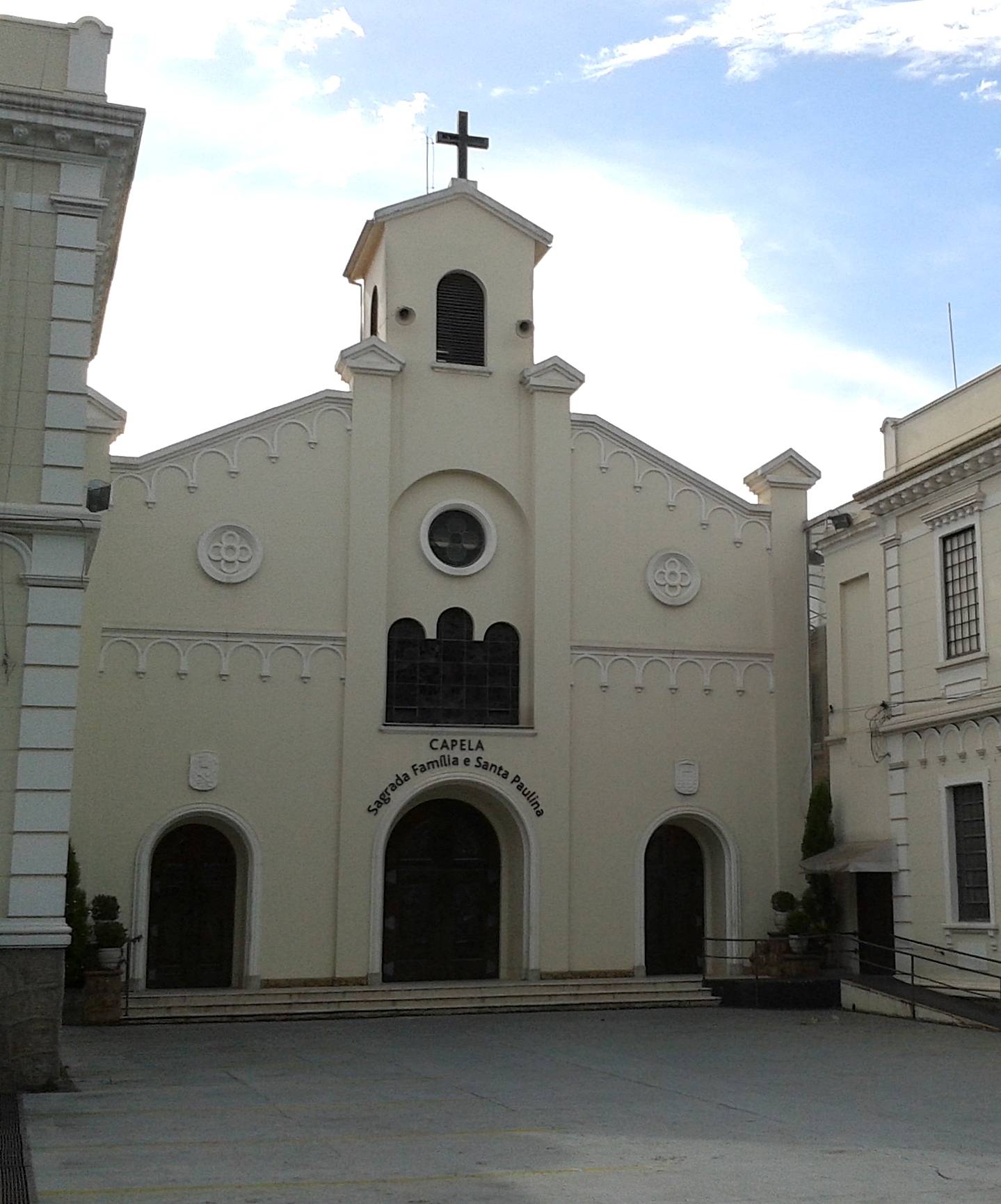 Capela Sagrada Família e Santa Paulina - Educandário Sagrada Família. Bairro do Ipiranga, São Paulo, SP, Brasil.